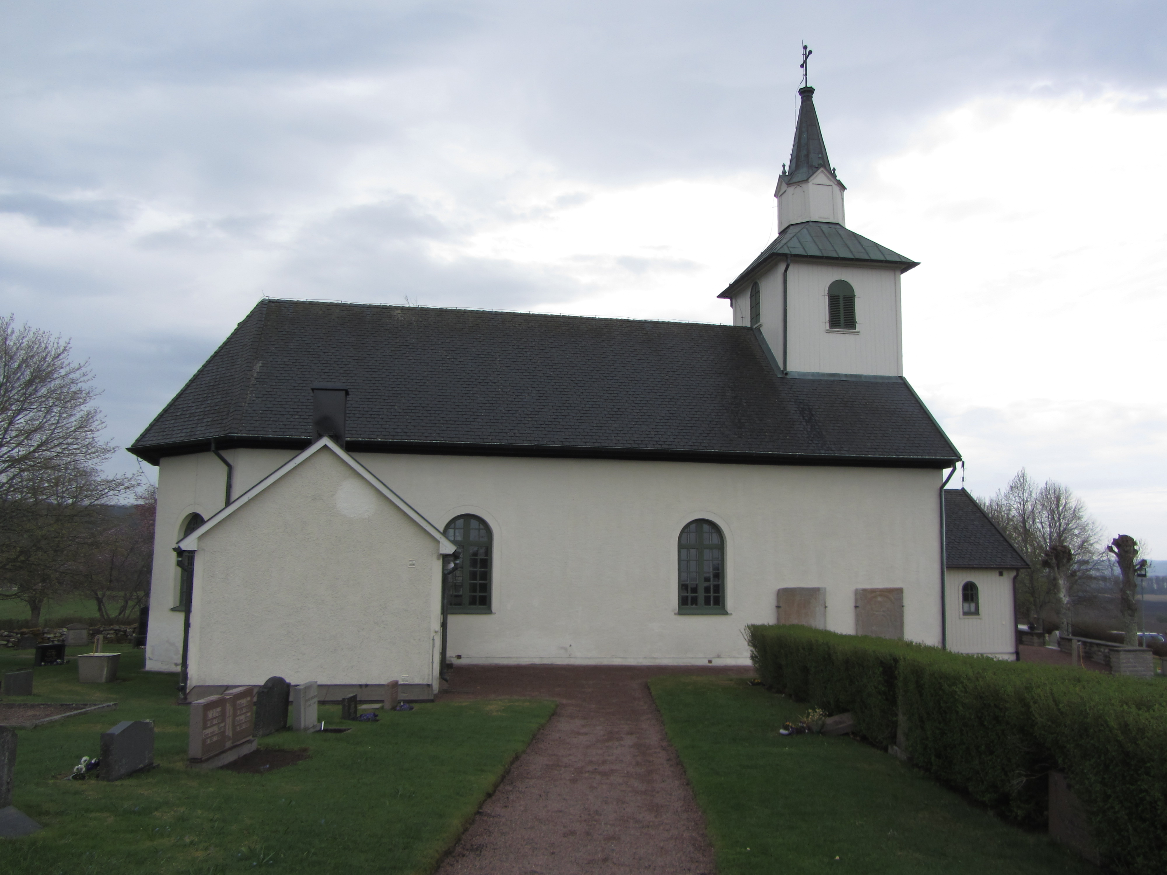 Timmersdala kyrka i Timmersdala mellan Skara, Skövde och Mariestad i Västergötland.